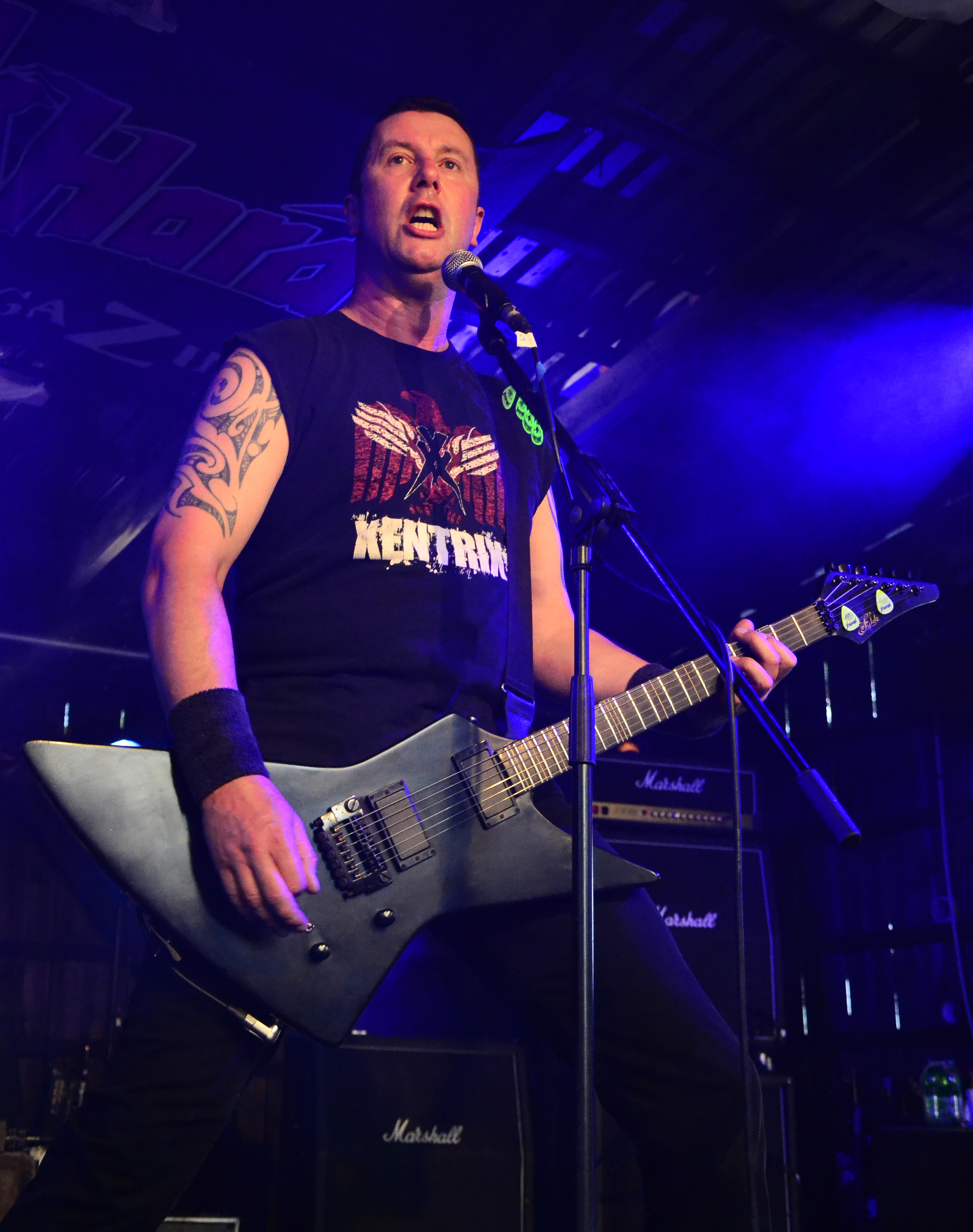 Chris Satley von Xentrix beim Headbangers Open Air 2014